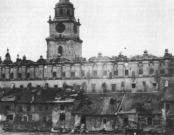 Tzw. Bogate kramy i Sukiennice przed przebudową w 1875 roku przez T. Prylińskiego